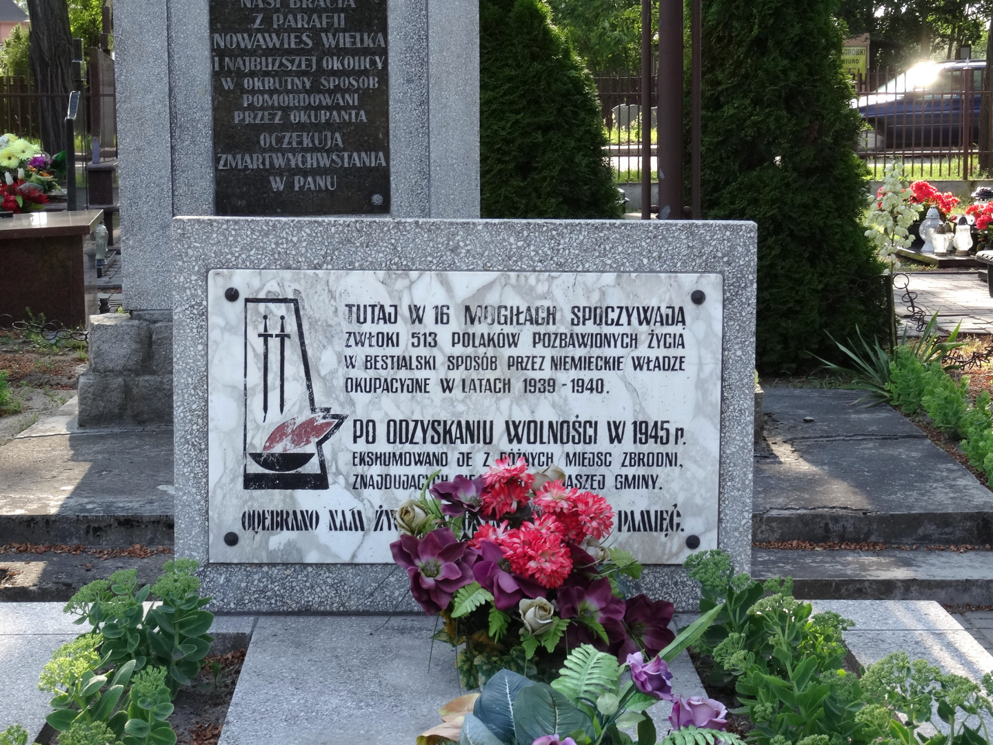 Cmentarz parafialny w Nowej Wsi Wielkiej, powiat bydgoski